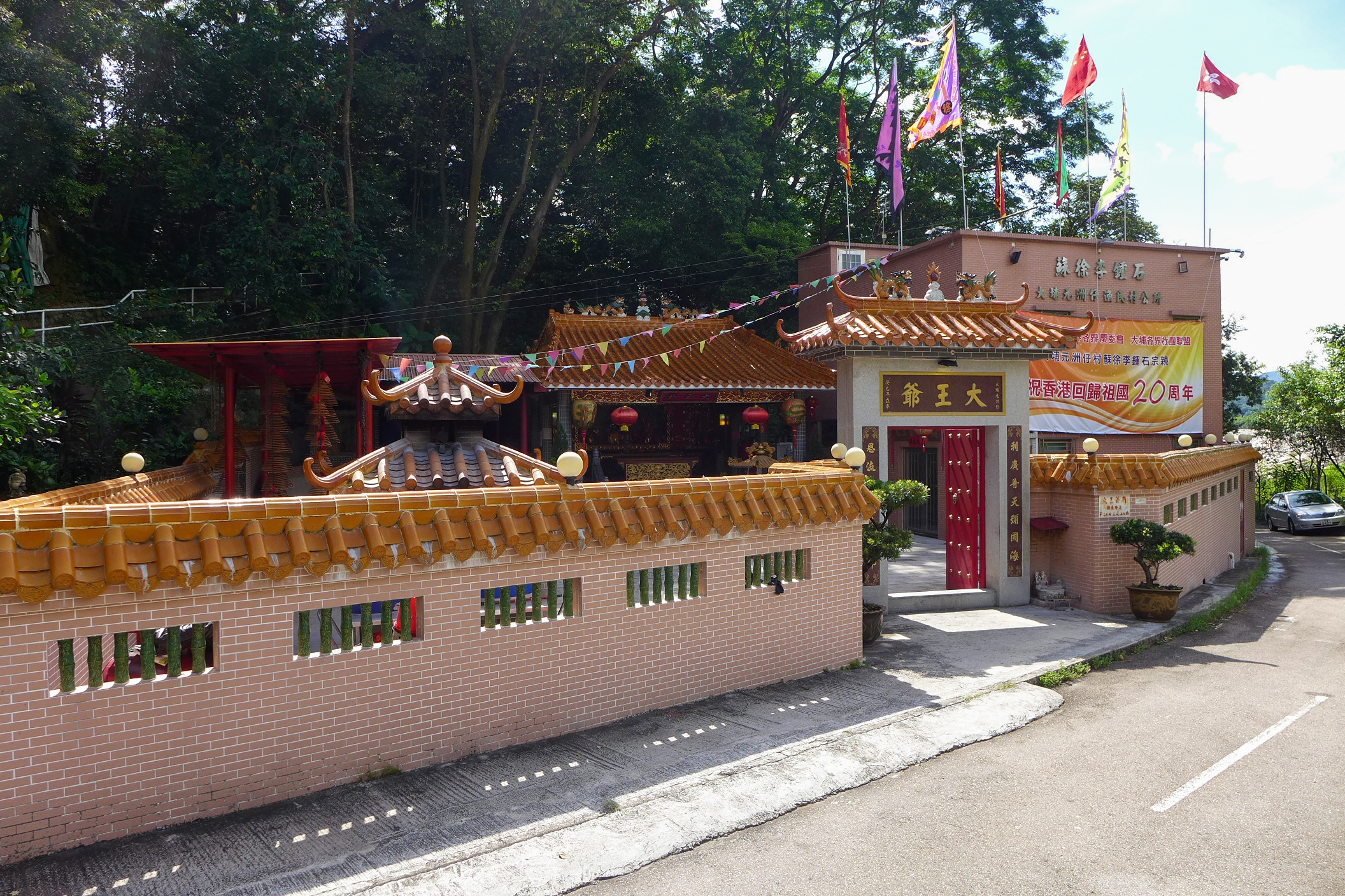 Tai Wong Yeh Temple Tai Po